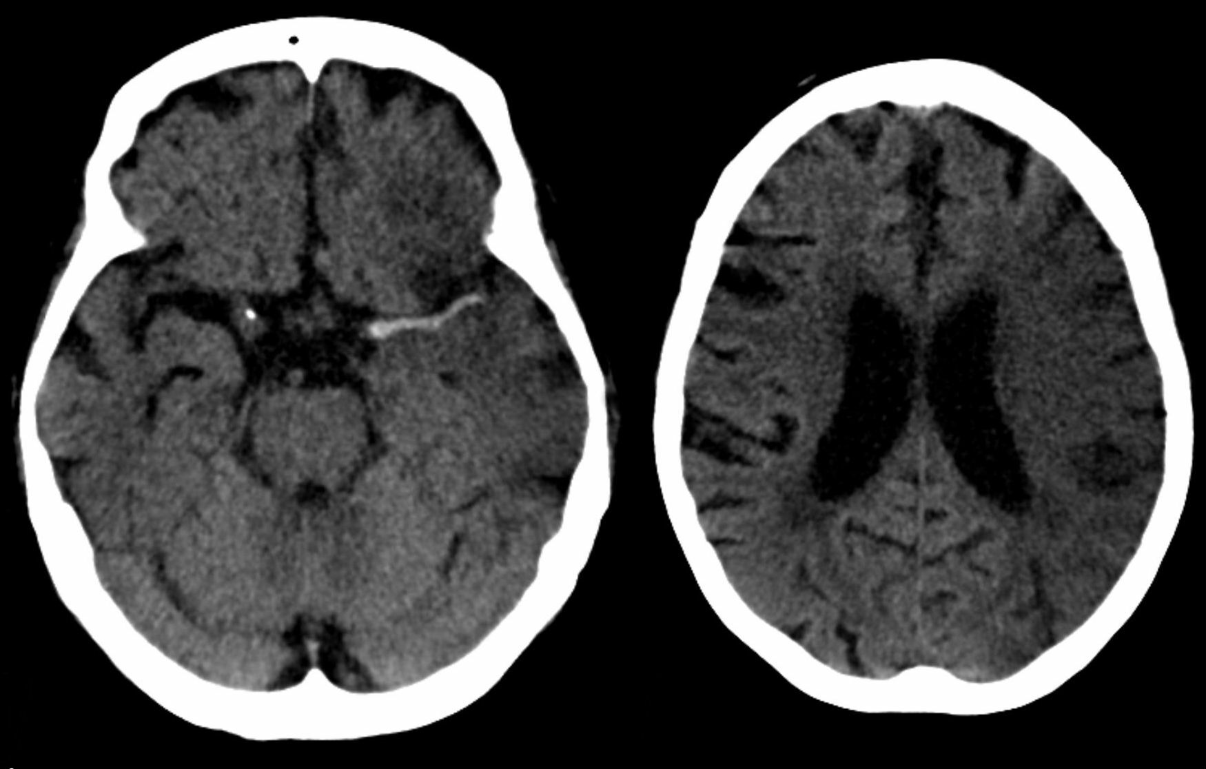 Frischer Infarkt im Stromgebiet der Arteria cerebri media mit sehr deutlichem "dens media sign" (allgemeiner "dens artery sign") oder deutsch "Dichte-Media-Zeichen", linkes Bild. Rechts der sich nach ca. 7 Stunden schon deutlich demarkierende Infarkt.